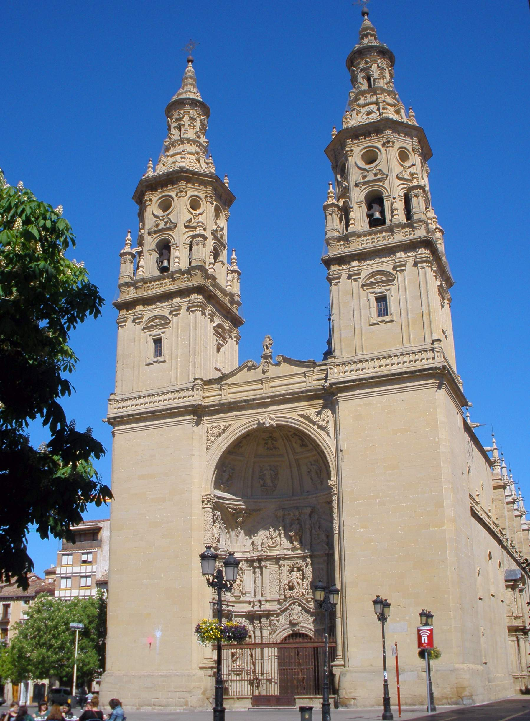 Catedral de Santa María de la Redonda, Logroño.